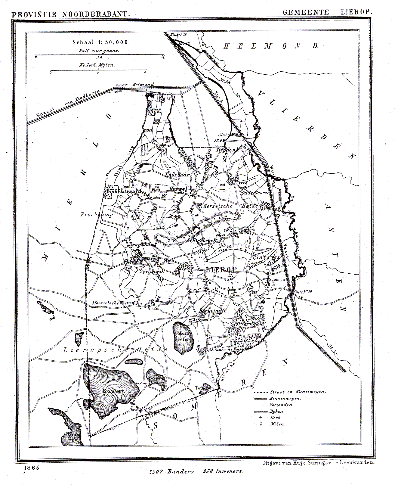 Nederland, Noord-Brabant, Gemeente Lierop